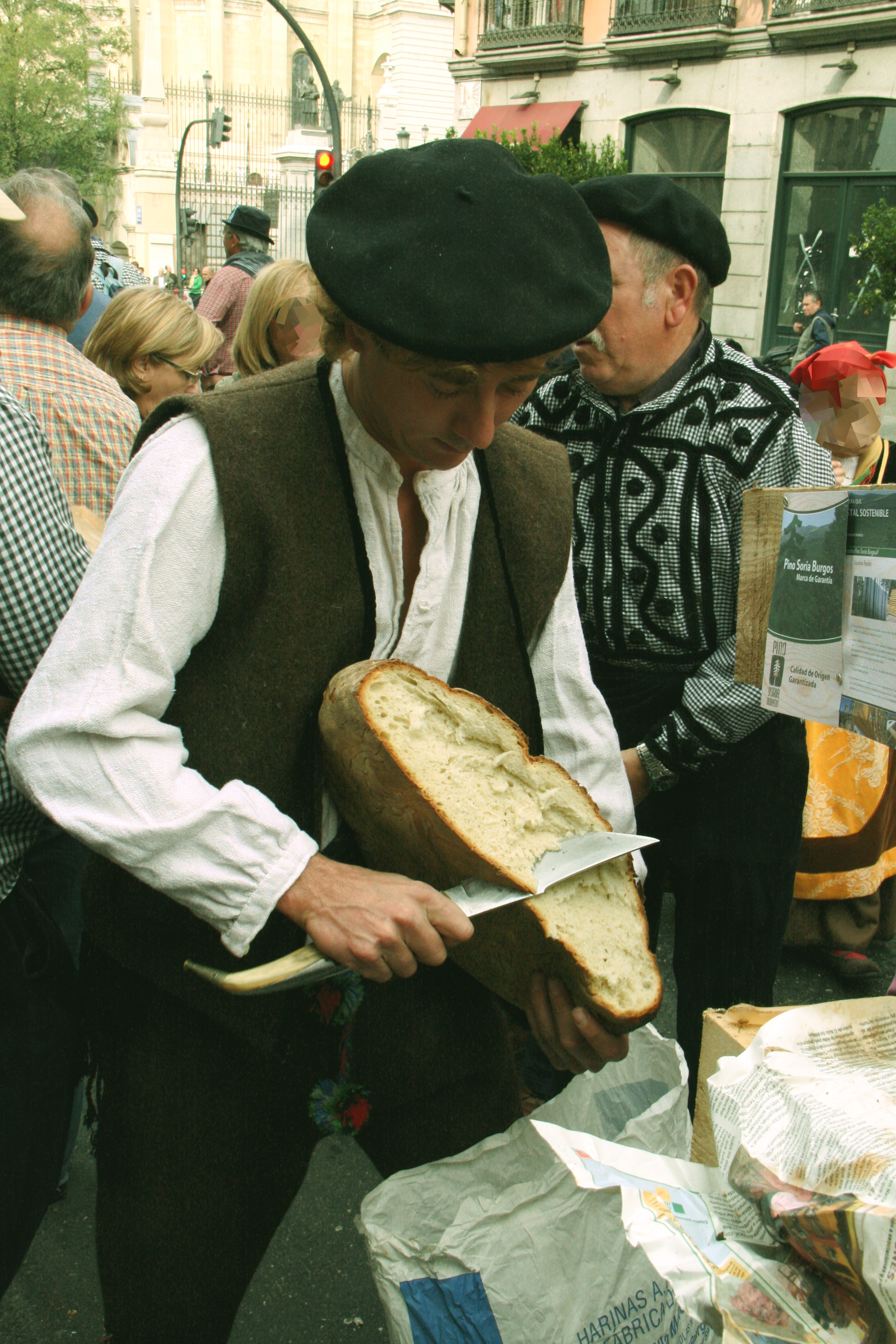 Pastor cortando pan con navaja